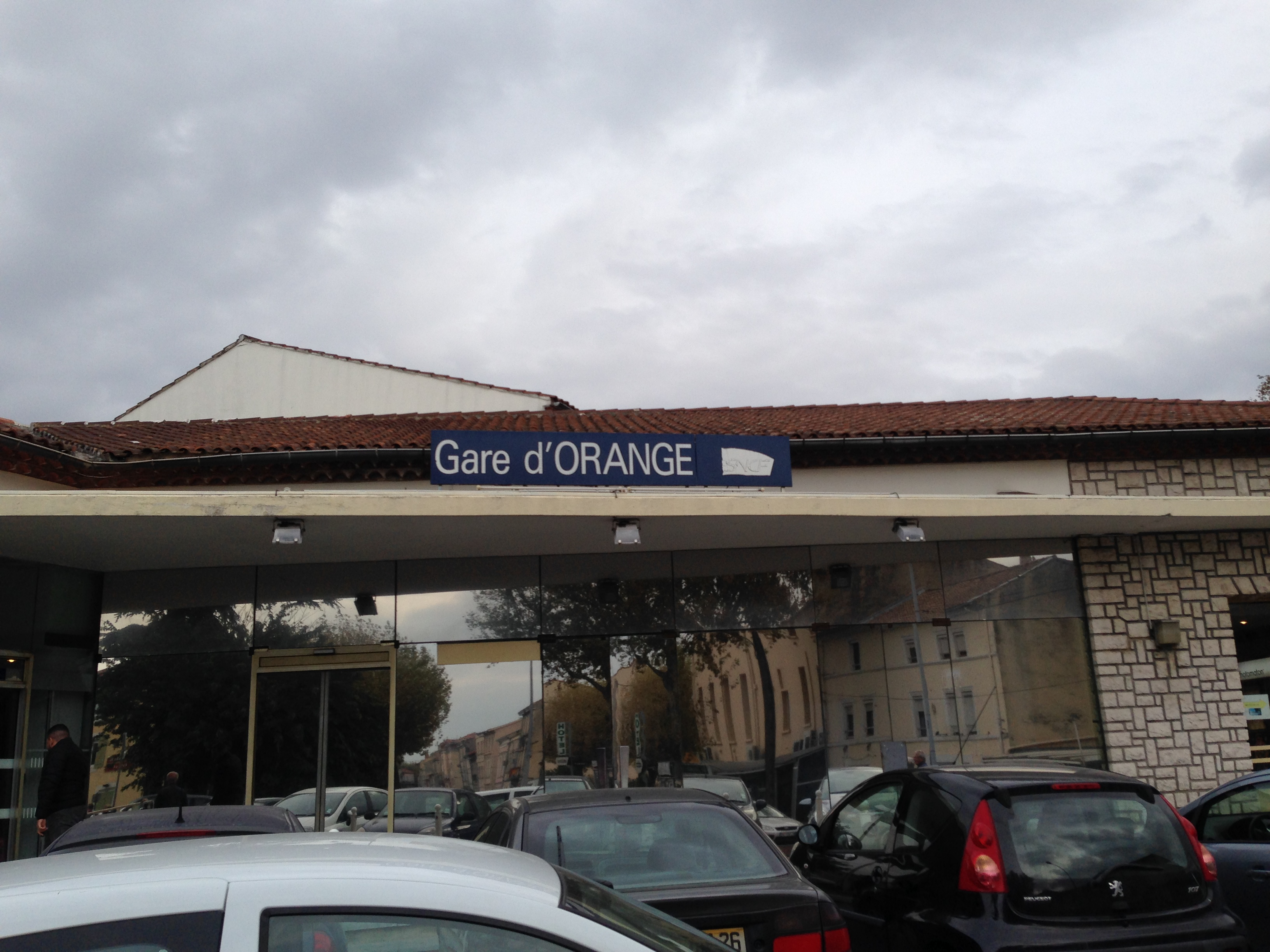 Gare d'Orange en 2017